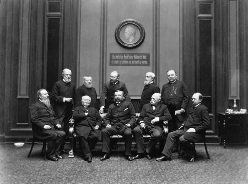 Mitglieder des Deutschen Reichstages 1.Reihe-sitzend- v.l.n.r.: Letocha, Dr. Wind[t]horst, Graf v. Chamaré, Dejanicz v. Gliszczynski, Horn 2.Reihe-stehend-v.l.nr.: Graf v. Praschma, Schmieder, Dr. Porsch, Dr. Frhr.Heereman v. Zuydwyk, Szmula. [Unter dem Medaillon P. Pfizer mit Inschrift "Das heiligste Recht einer Nation ist das, als solche zu bestehen und anerkannt zu werden." Aufnahme aus Fotoalbum der "Deutsche Reichstag und sein Heim"] Abgebildete Personen: Praschma, Hans Freiherr von Bilkau, Graf: MdR, Mitglied des Abgeordnetenhauses Preußen, Deutschland Porsch, Felix Dr.: Vizepräsident (MdL) des Landtages von Preußen, Zentrum, Deutschland Windthorst, Ludwig Dr.: Justizminister des Königreichs Hannover, Reichstagsabgeordneter (MdR), Rechtsberater und Bevollmächtigter König Georgs V., Deutschland (GND 118633678)